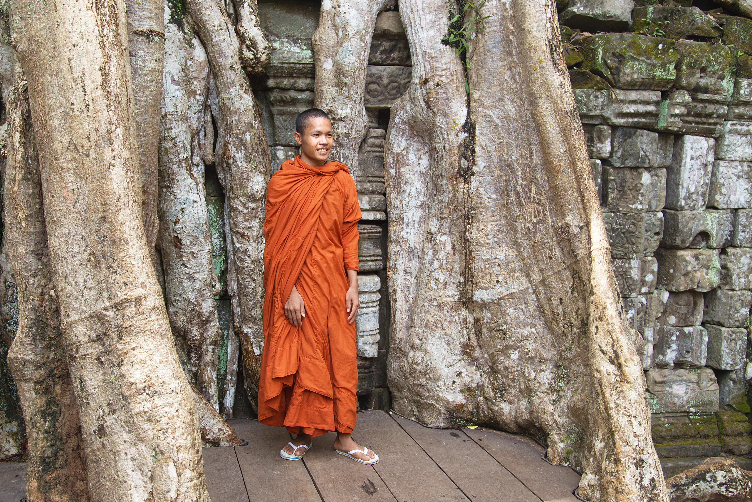 A monk at Ta Prohm, Angkor, Siem Reap, Cambodia